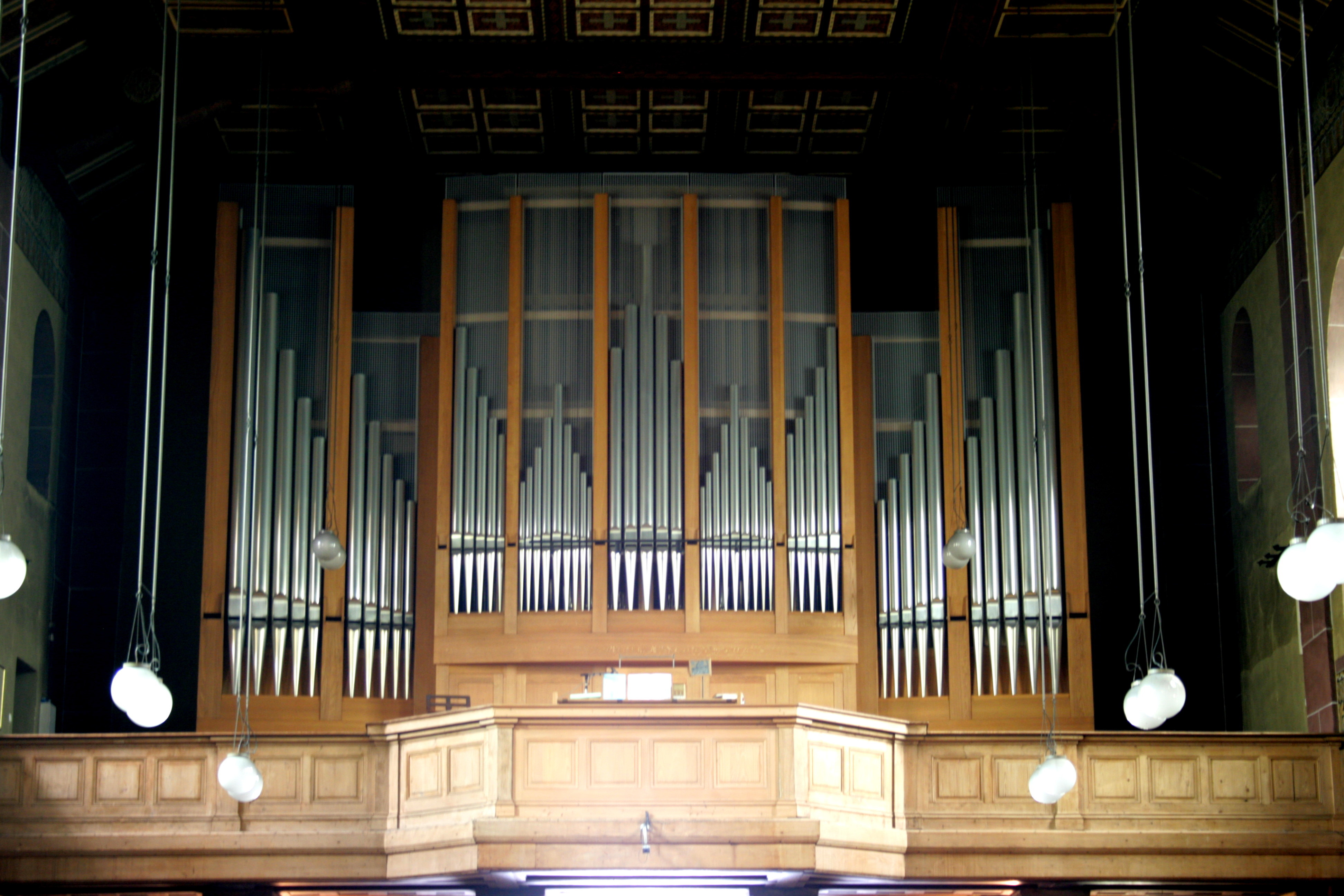 Sankt Laurentius am Konrad-Adenauer-Platz in Bergisch Gladbach